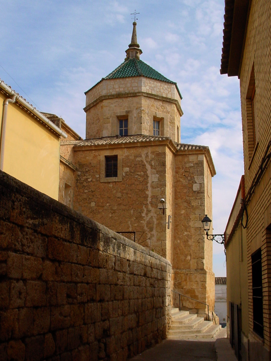 Iglesia de Iniesta